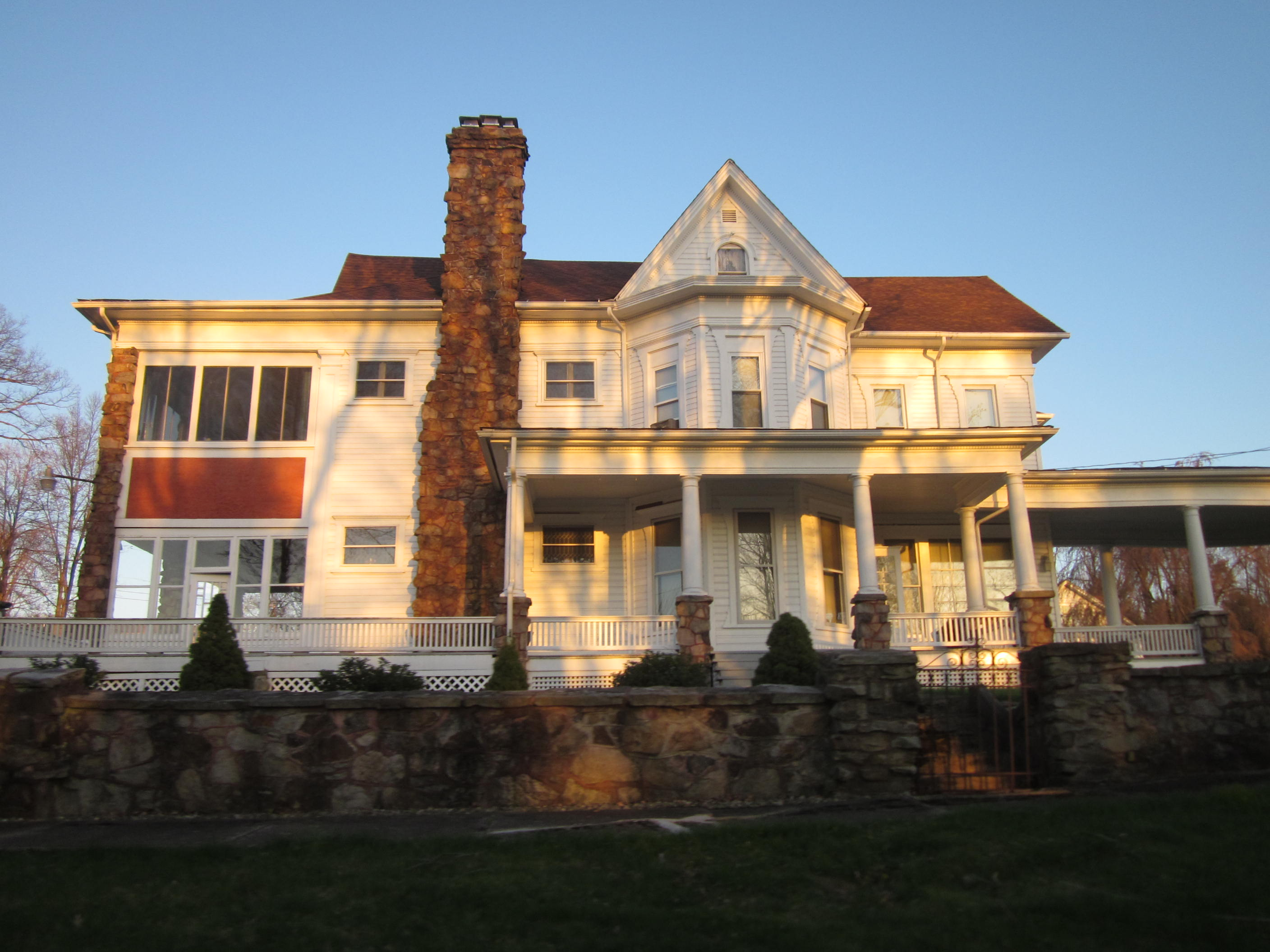 Janesville, Pennsylvania